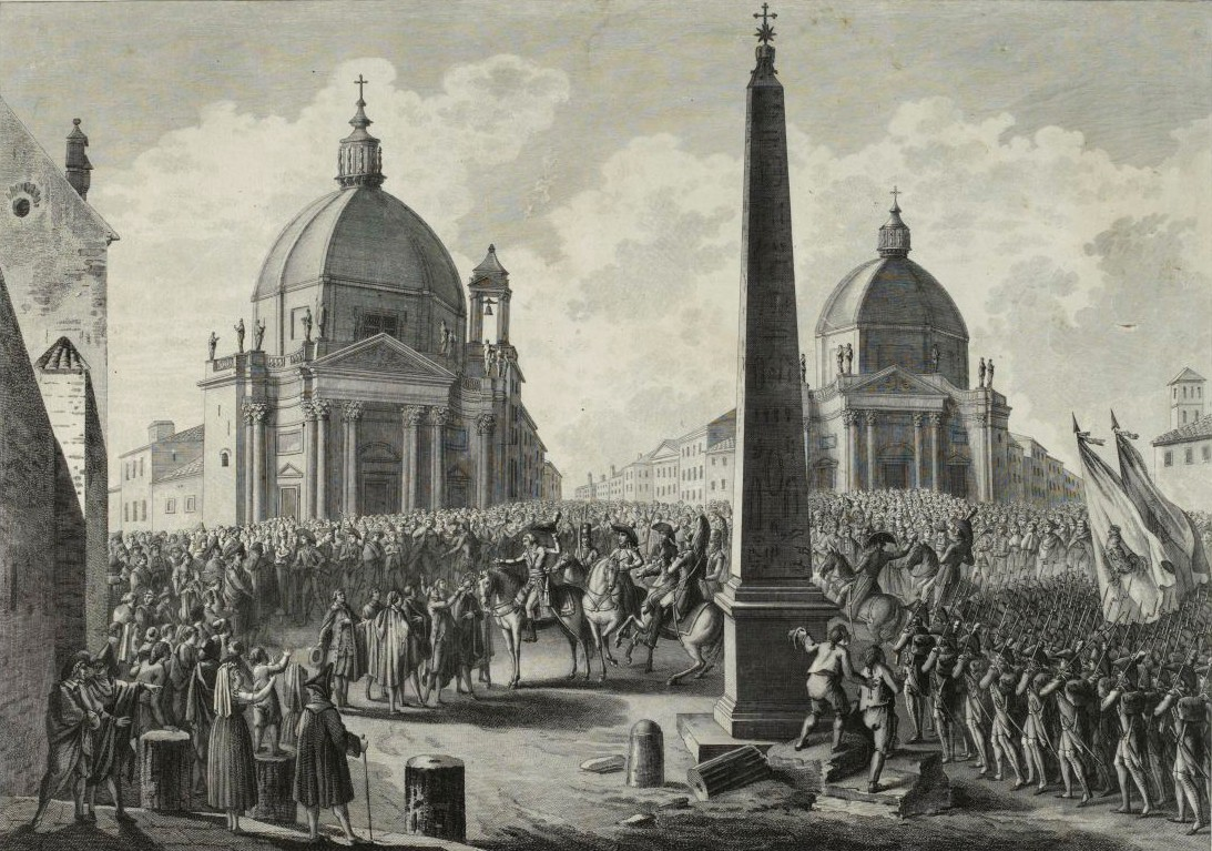 Entrée de l'armée française dans Rome le 15 février 1798, Musée de la Révolution française - Vizille.